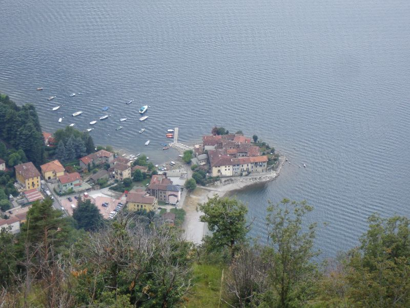 Porto di Lierna e borgo Castello